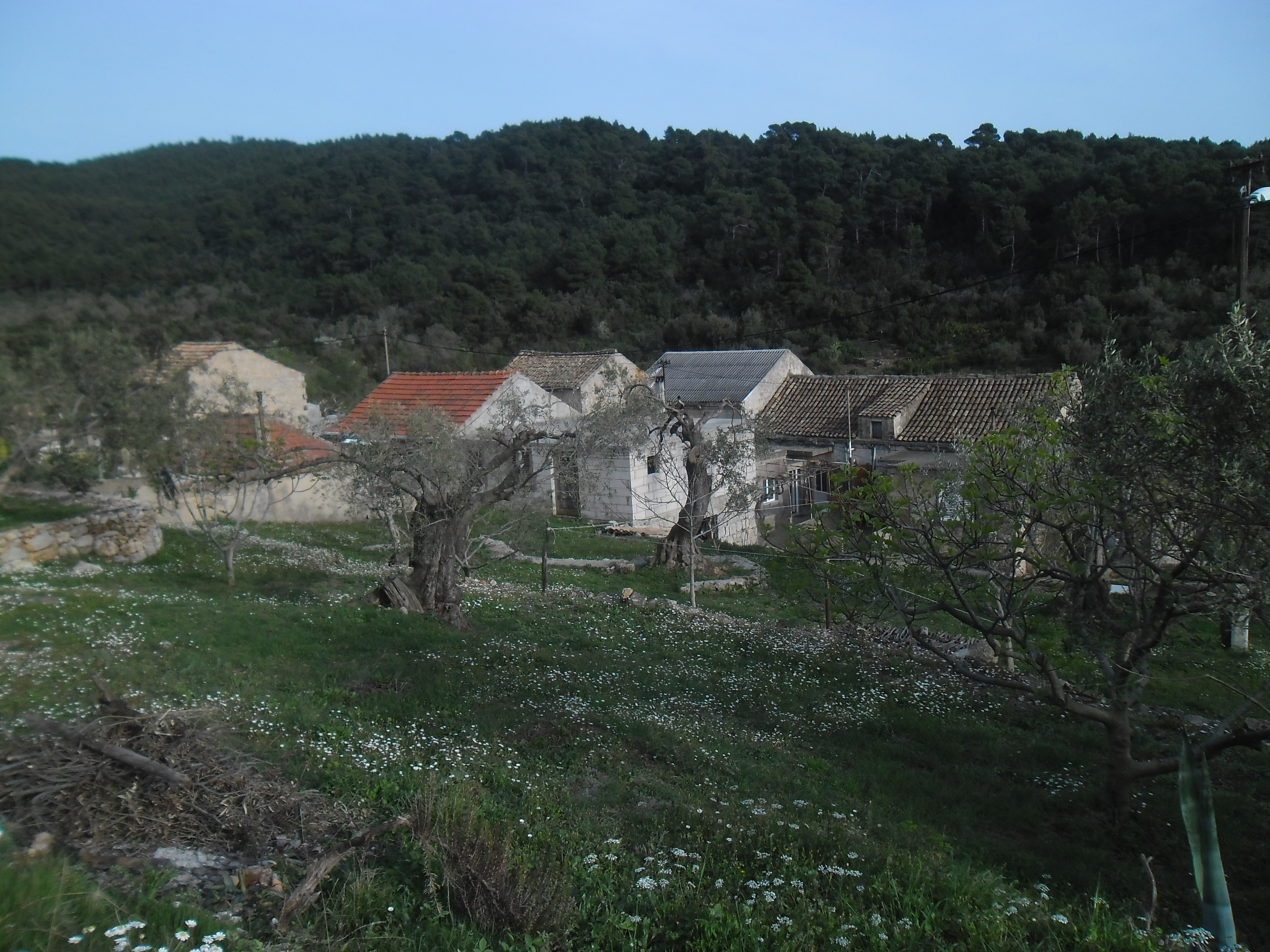 naselje Ropa na otoku Mljetu